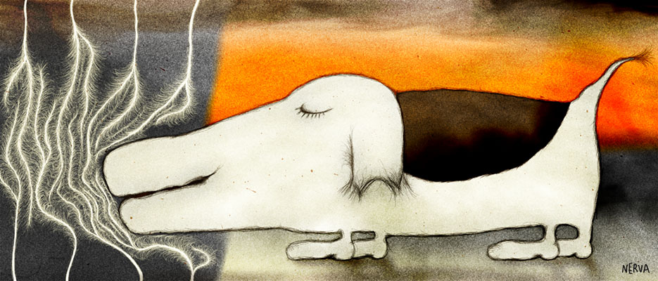 Smells Like a Pillow